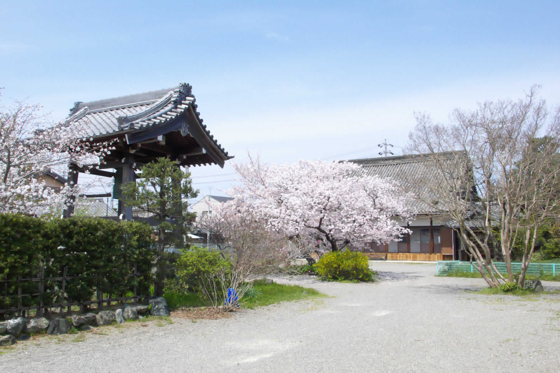 Koumyouji temple at Ise, Mie, japan.